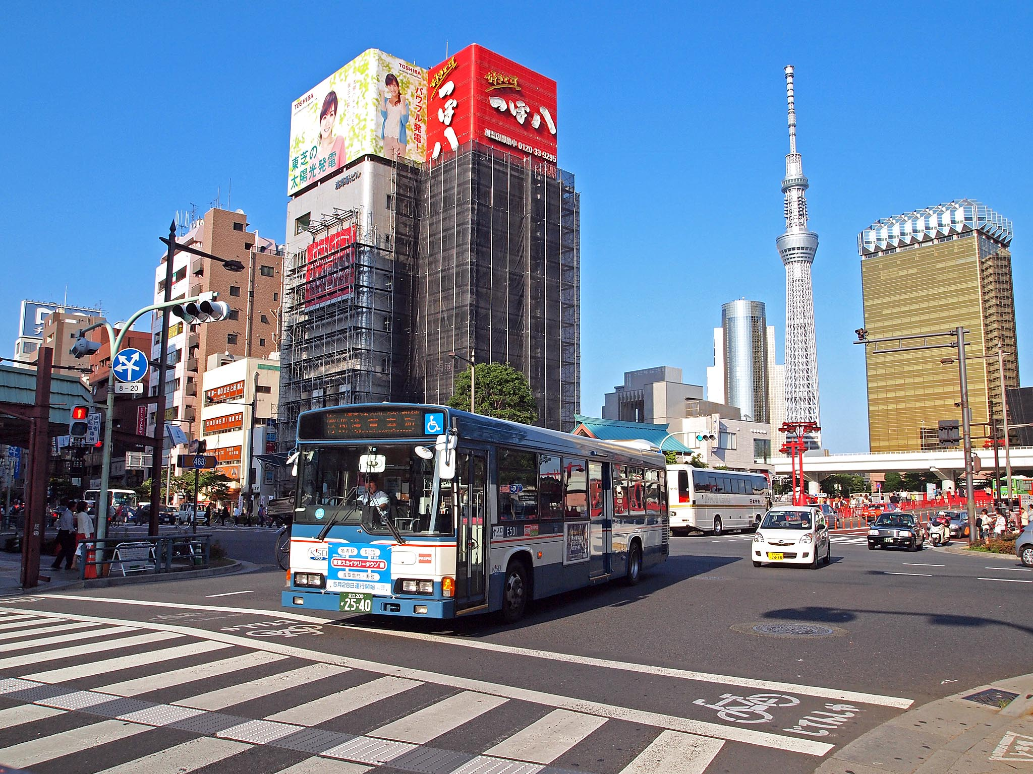 2012年5月に開設された京成バス新小59系統・新タワー線。江戸川営業所の担当で、主に写真の日野・レインボーHRが就役する。 登録番号：足立200か2540 撮影地：東京都台東区浅草、吾妻橋交差点